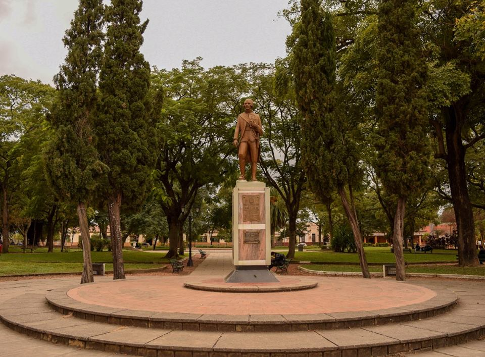 Don Ramon Garcia de Leon y Pizarro